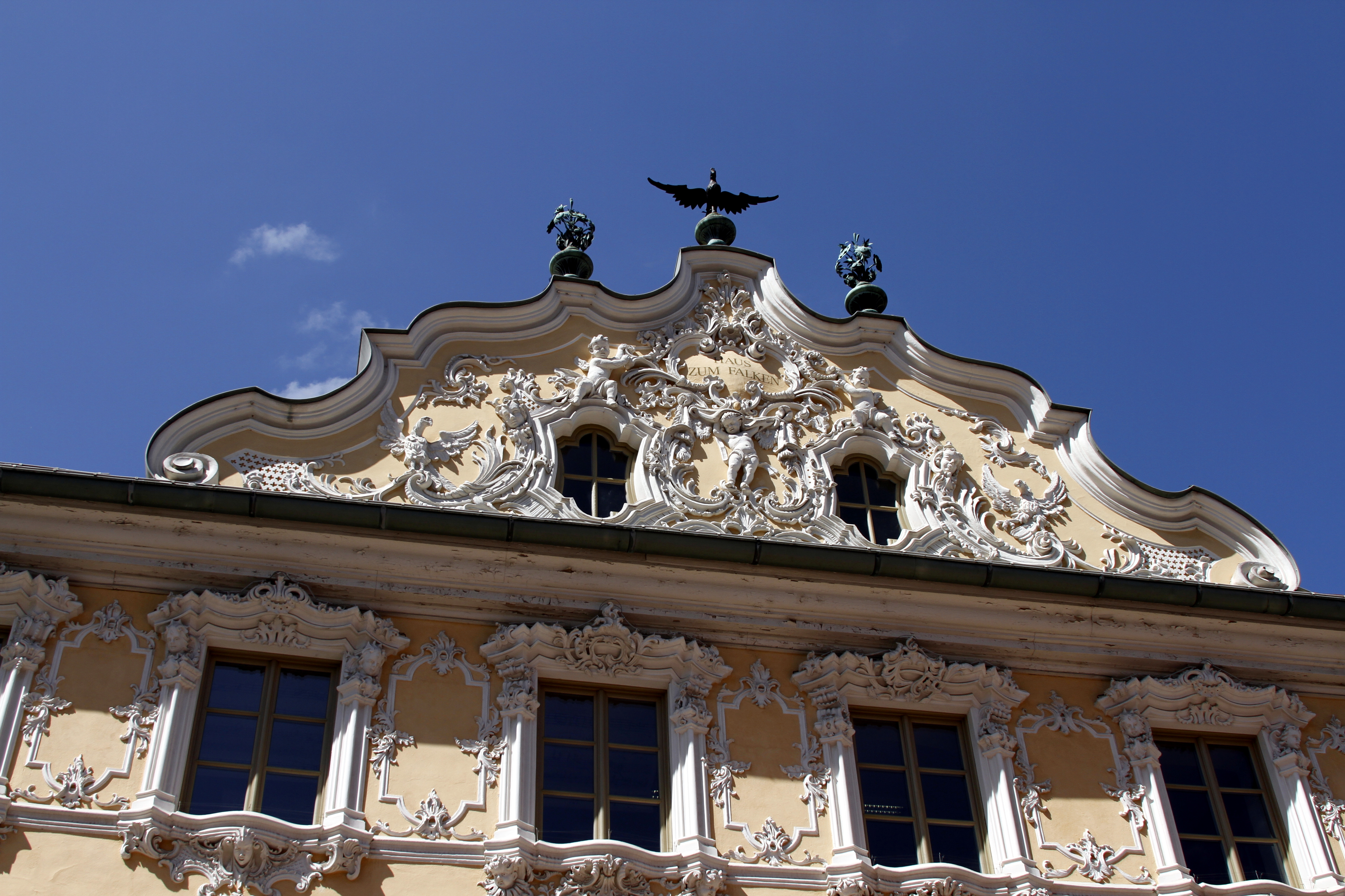 Falkenhaus - Würzburg - Germany